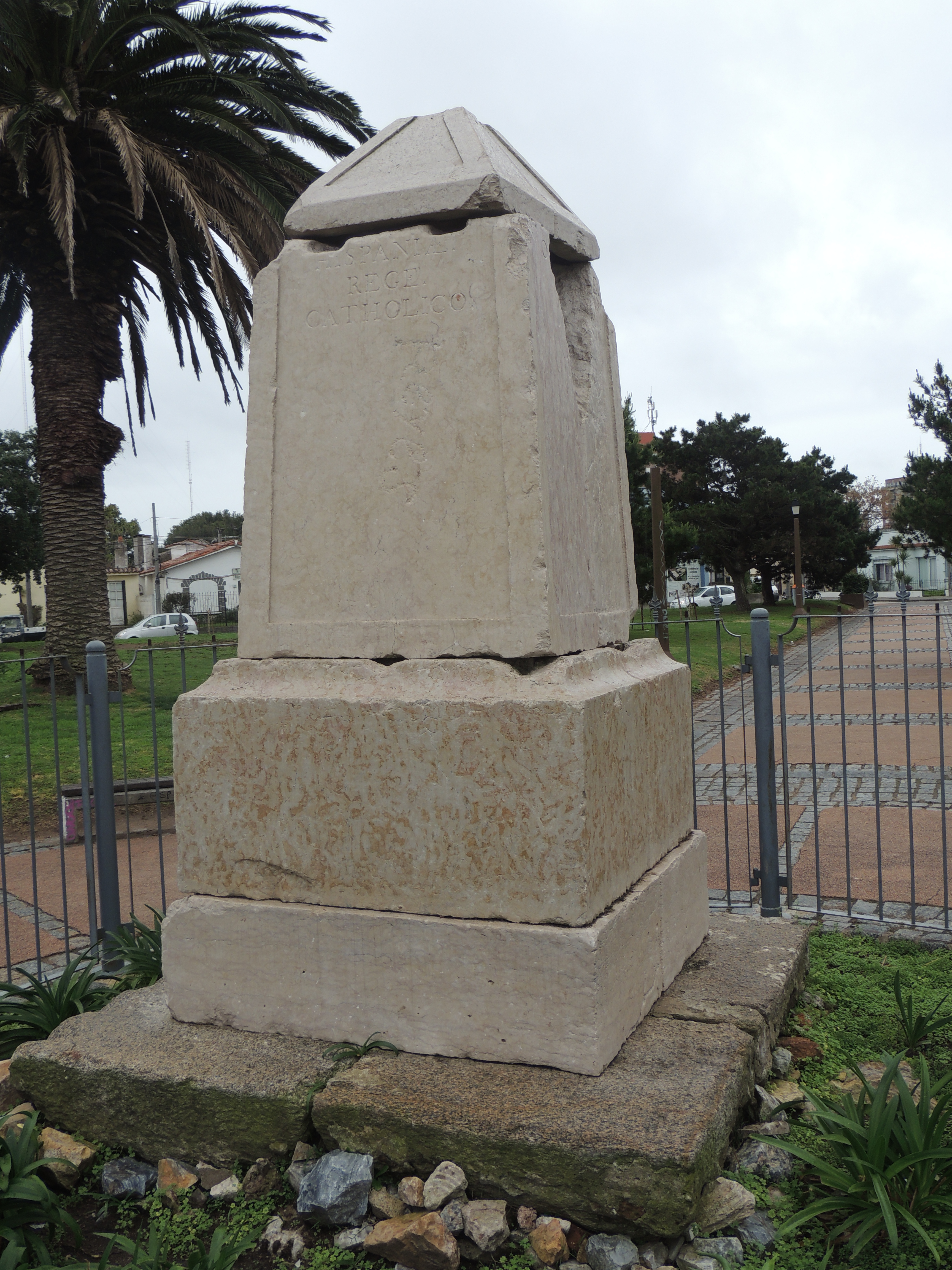 Marco llamado tradicionalmente De los Reyes, que originalmente estaba ubicado en el cerro de los Reyes de las sierra de Carapé, colocado el 8 de enero de 1753 (Tratado de Madrid de 1750) y trasladado a su actual ubicación en 1895". Ubicada en el departamento de Maldonado